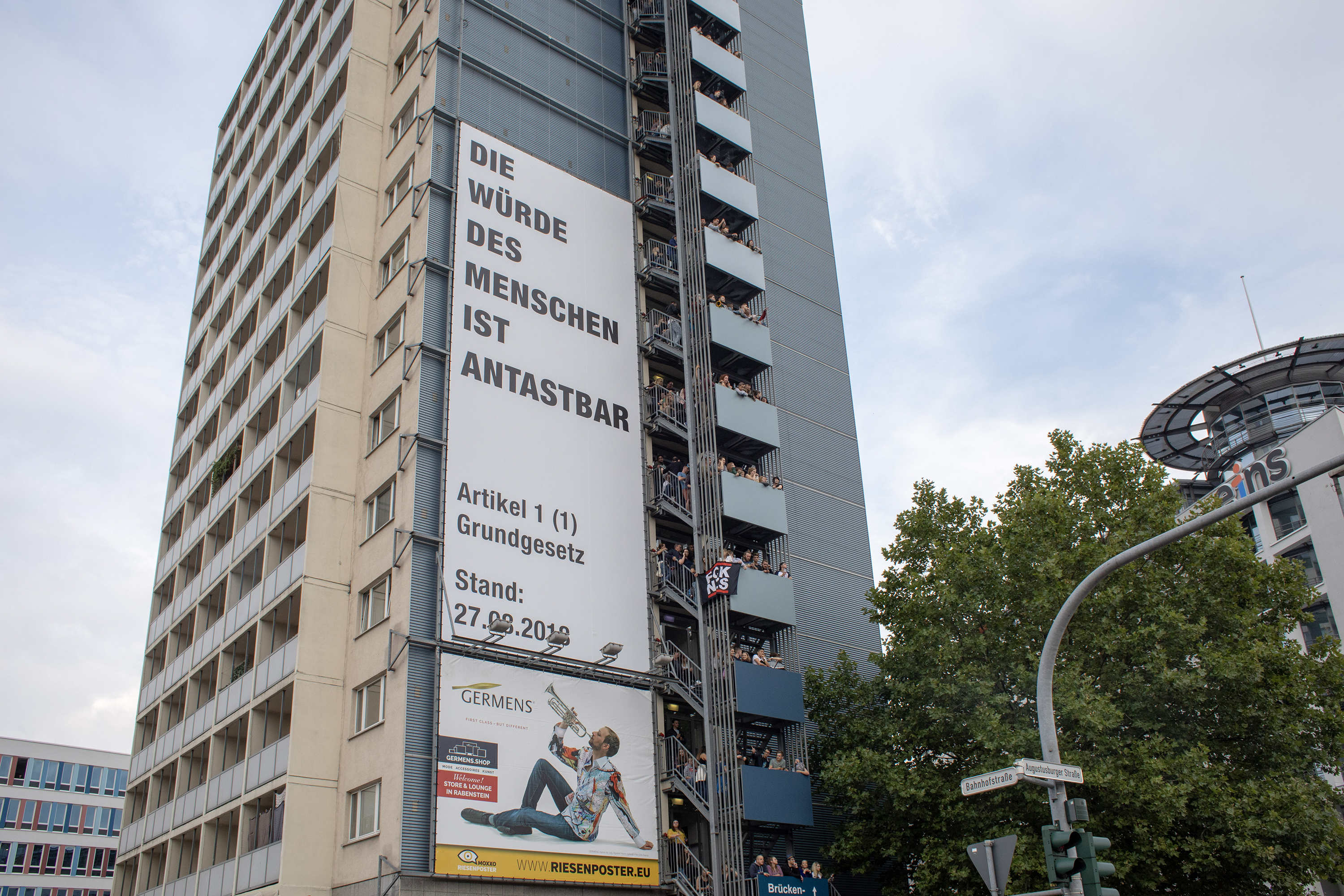 WirSindMehr Chemnitz Demonstration 2018 Menschenwürde